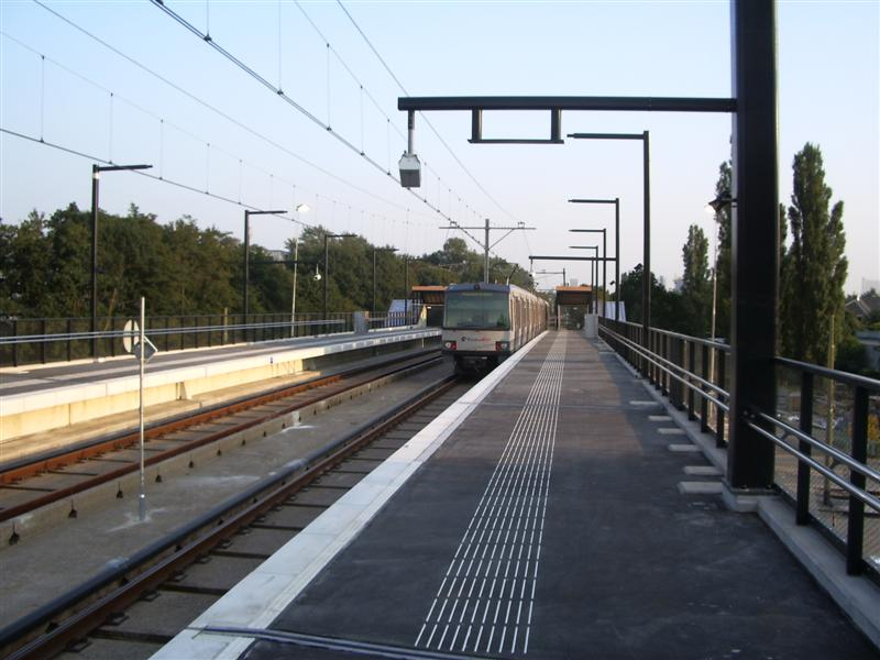 Metrostation Melanchthonweg aan de Hofpleinlijn (RandstadRail), september 2006.